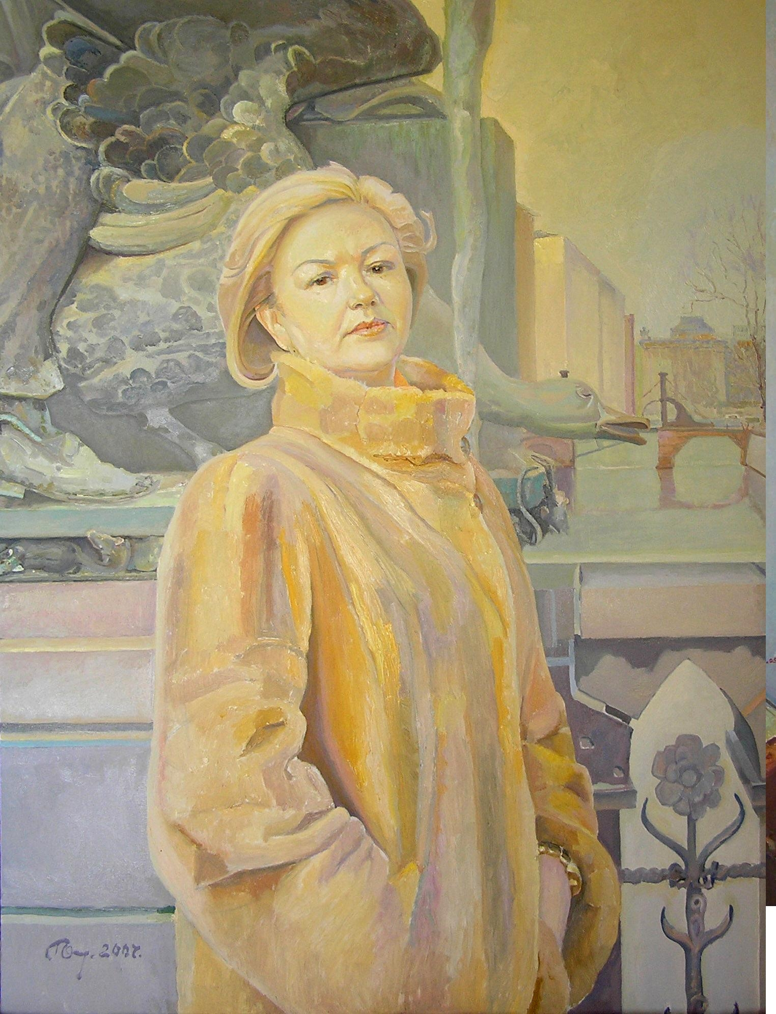 Ольга Логовитская, 2007.